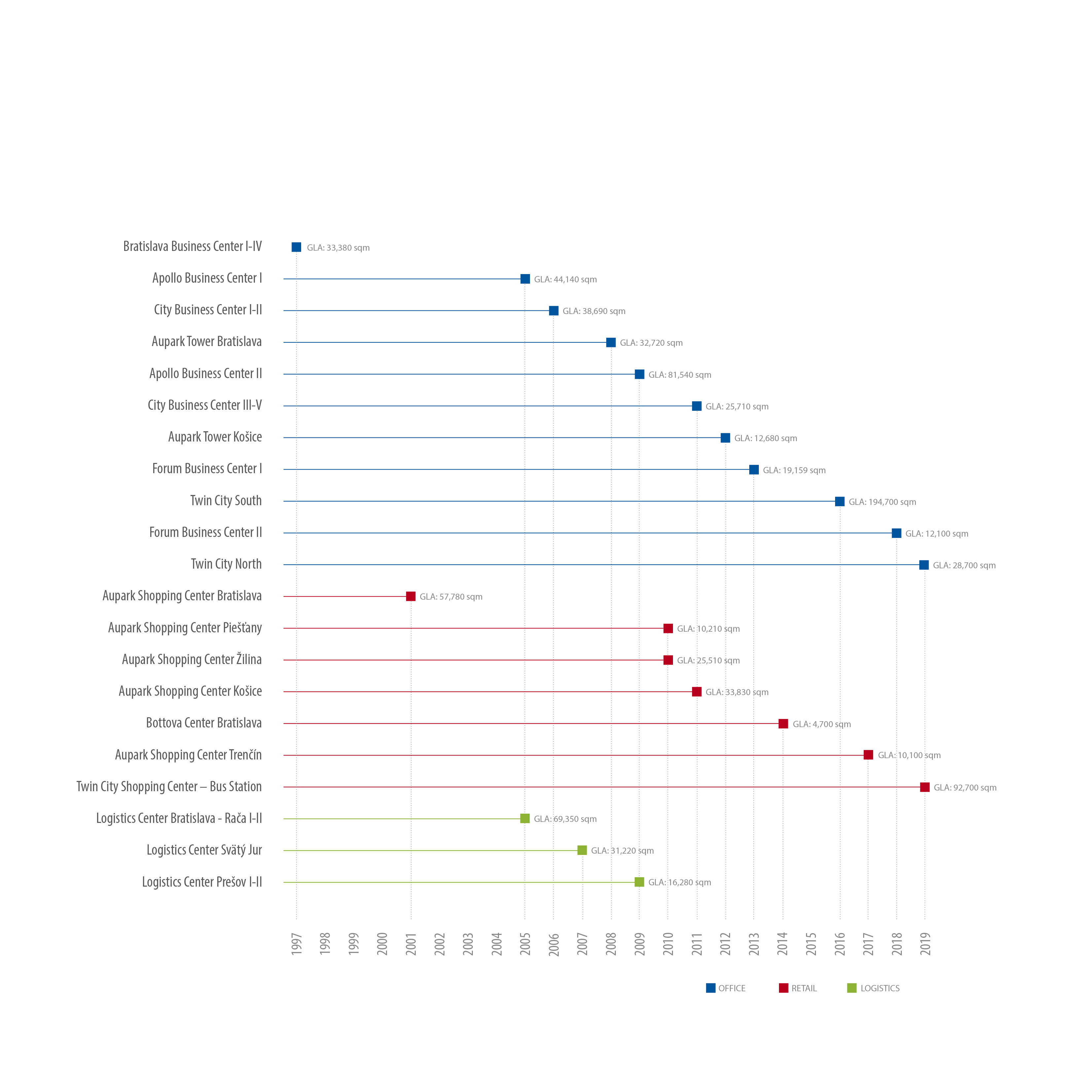 Projekty HB Reavis Slovakia